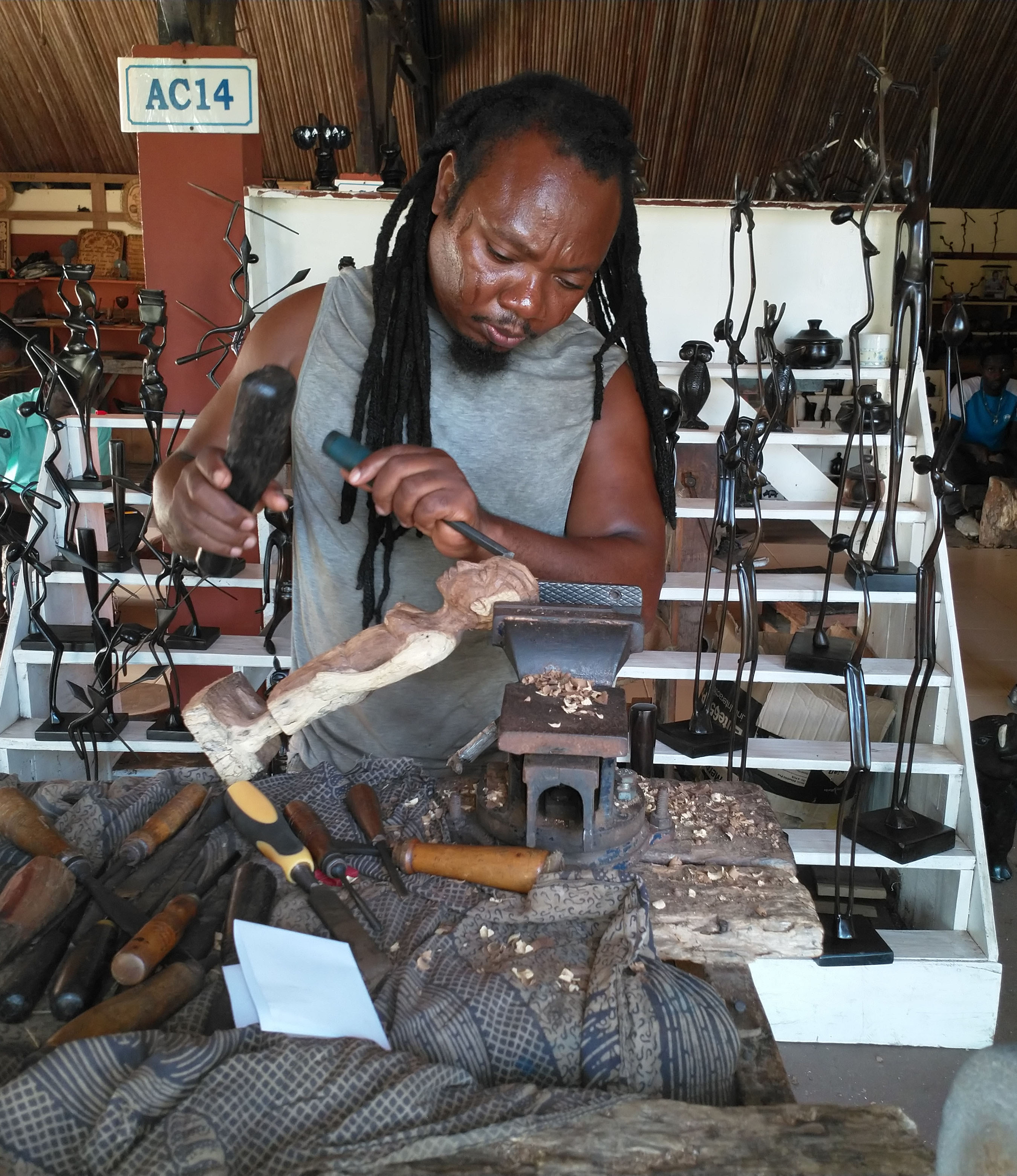 Il sculpte et crée des objets d'art de toute forme au centre de promotion de l'artisanat de Cotonou. De nombreux touristes y passent pour s'offrir des souvenirs authentiques du Bénin This is an image of "African people at work" from Benin